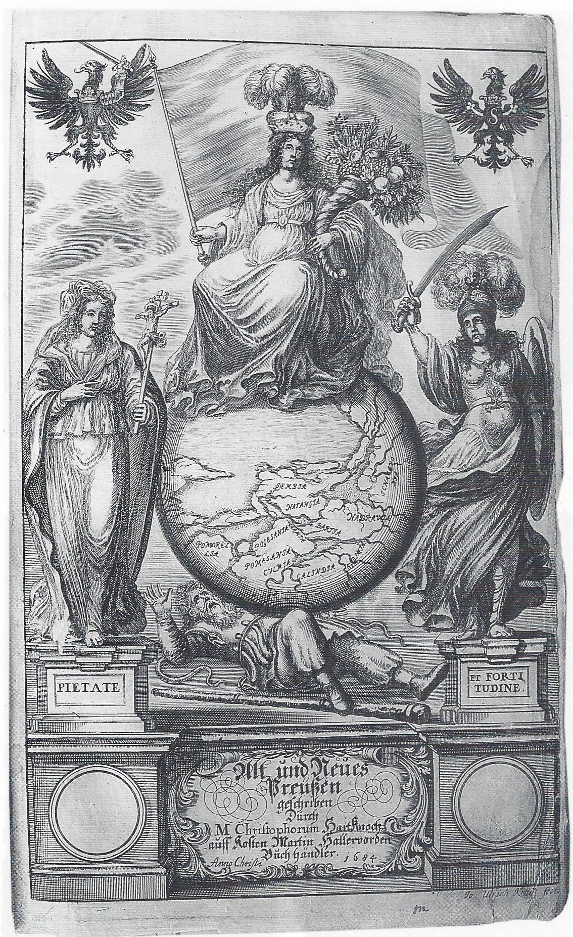 VI.10. Chr. Hartknoch: Alt- und Neues Preussen. Frontispiz.